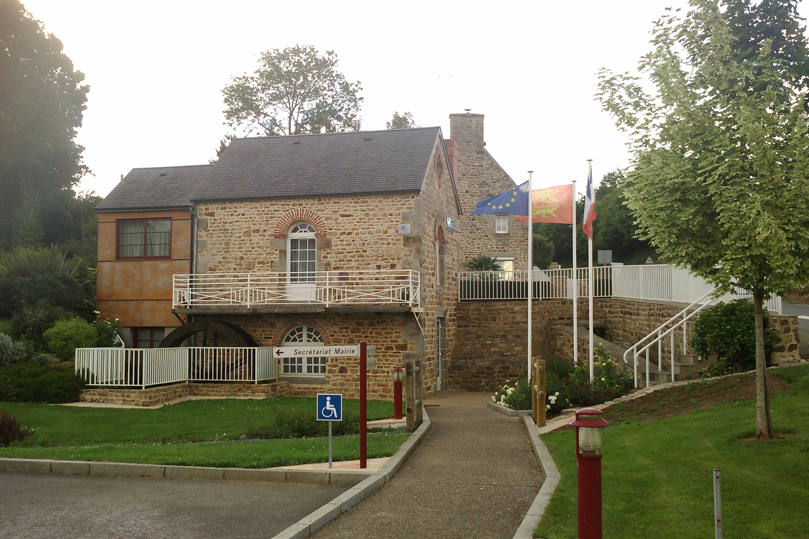 Mairie de Plomb (Manche)